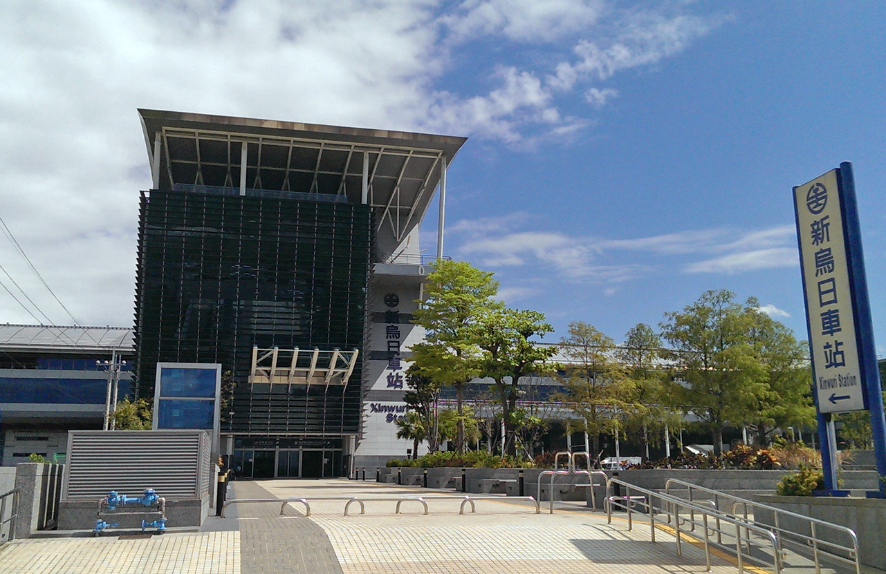 中文（台灣）: 新烏日車站